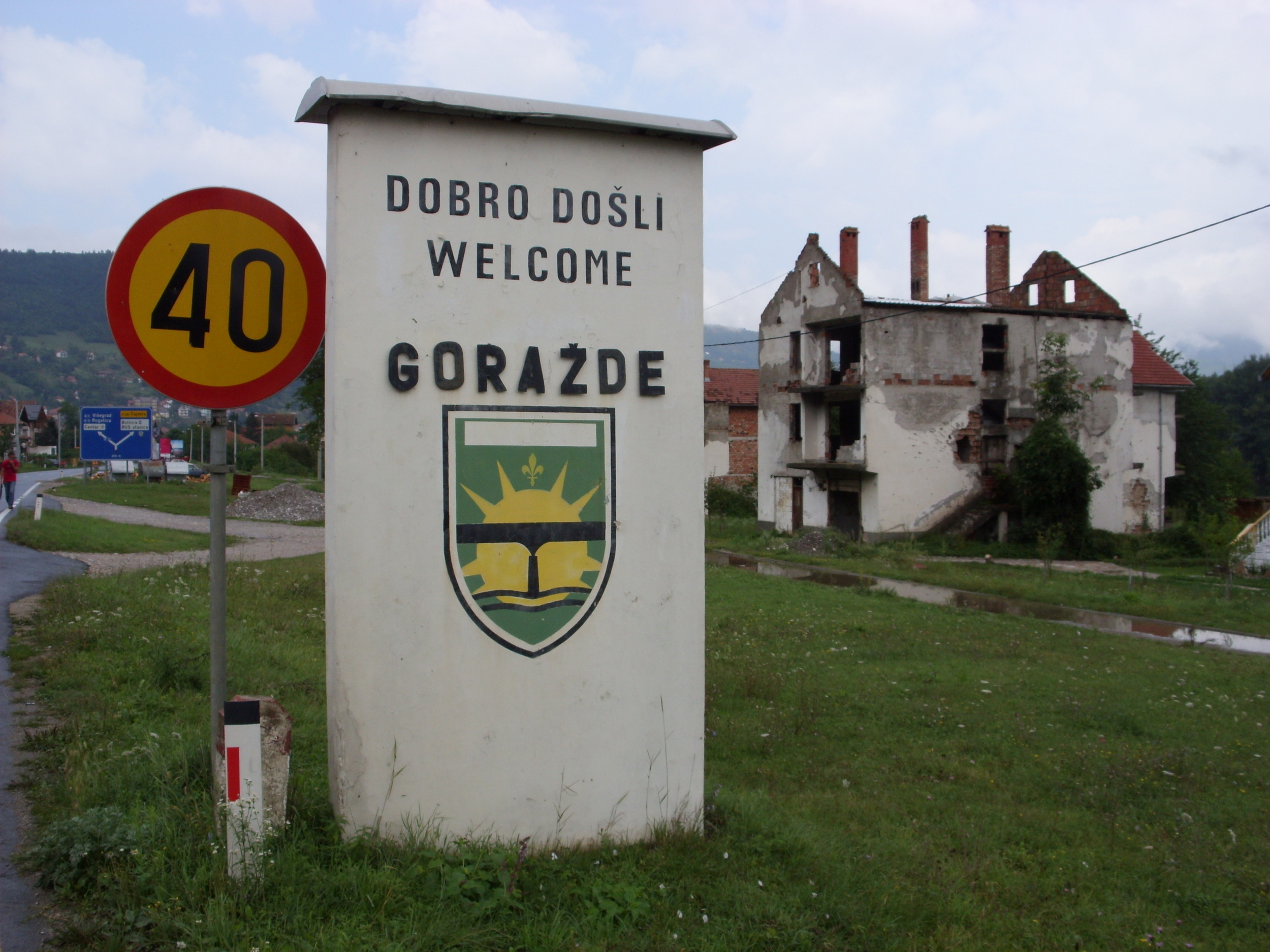 Willkommen in Goražde